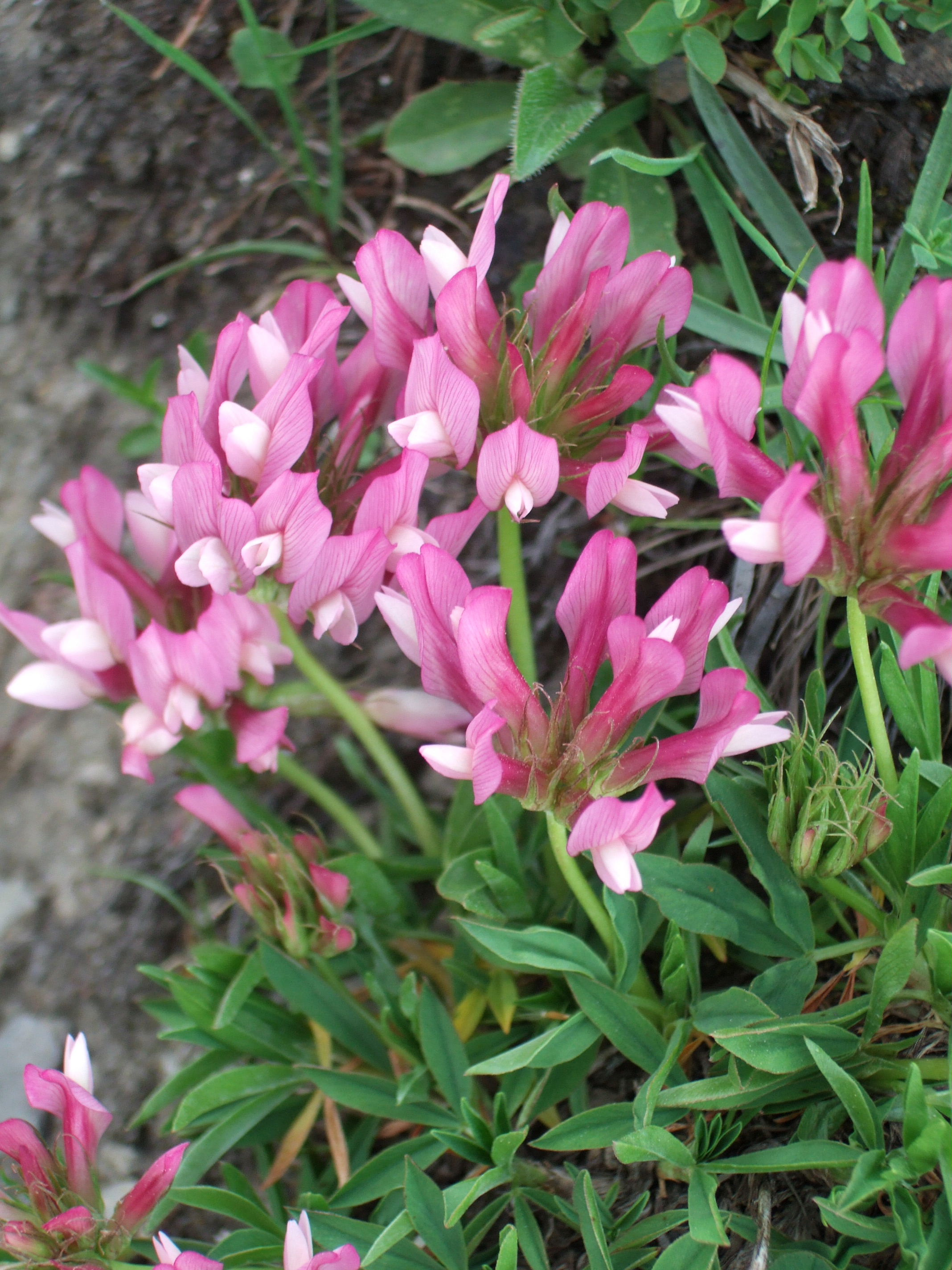 Trifolium alpinum at Kleine Scheidegg, Switzerland